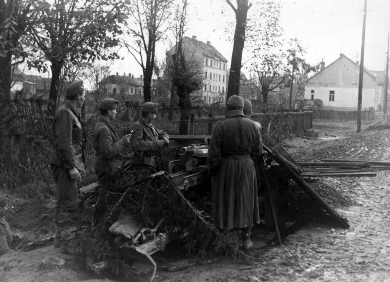 This description has been identified as biased or incorrect: Original Nazi-propaganda descriptionUngarn, November 1944 Kampfraum Ungarn Erst gestern brach der Feind hier ein, wurde aber im Gegenstoss sofort zurückgeschlagen. Erbitterte Strassenkämpfe forderten Opfer auf beiden Seiten. Ungarische Pak sichert die Ausfall-Strassen vor erneuten bolschewistischen Überfällen. SS-PK: Keimling 13/31a T.3595